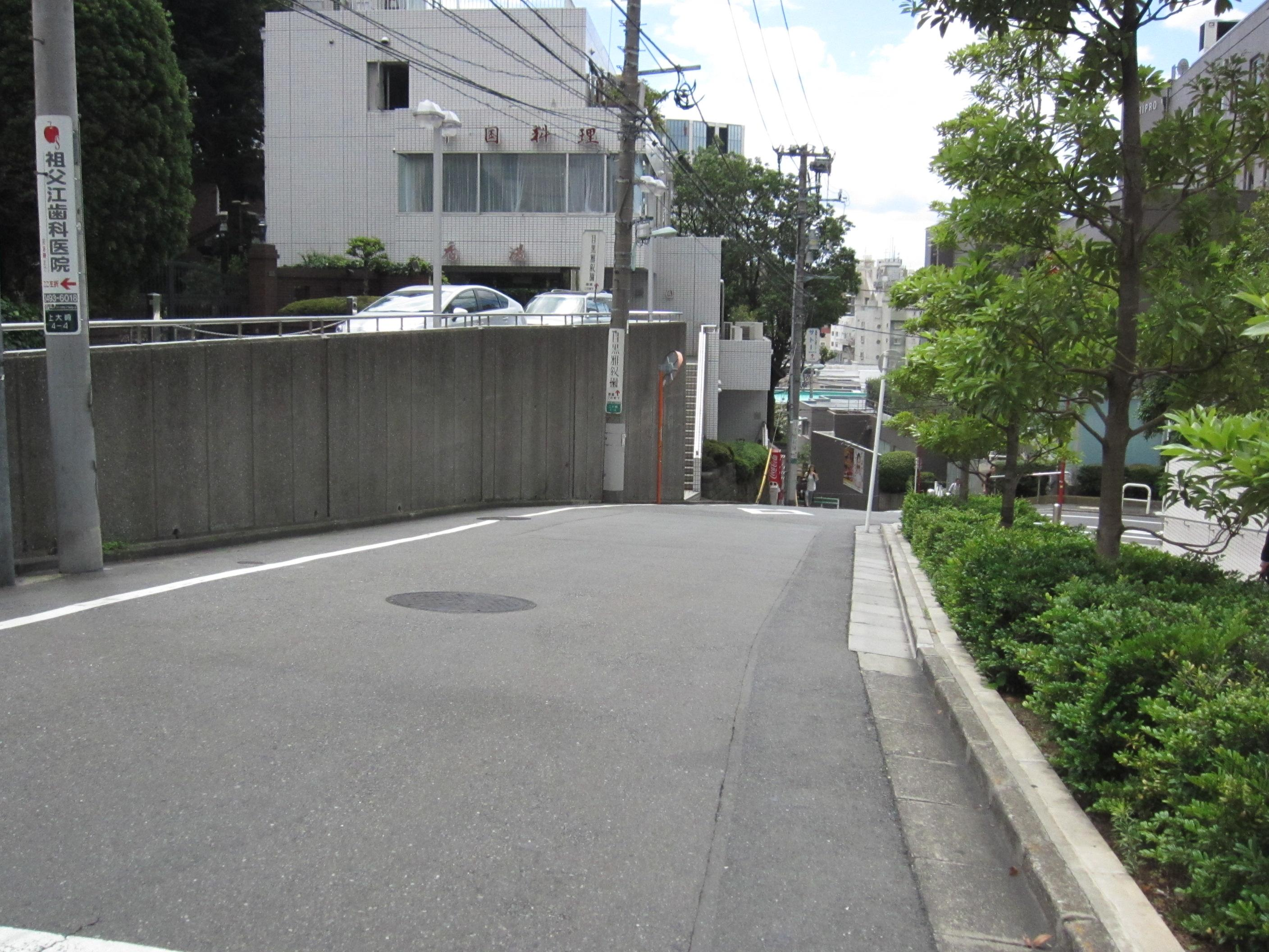 行人坂です